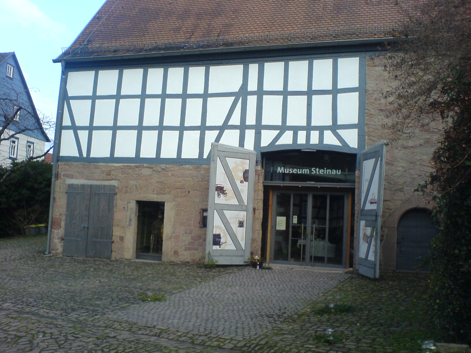 Museum Steinau a.d.Straße (außen).